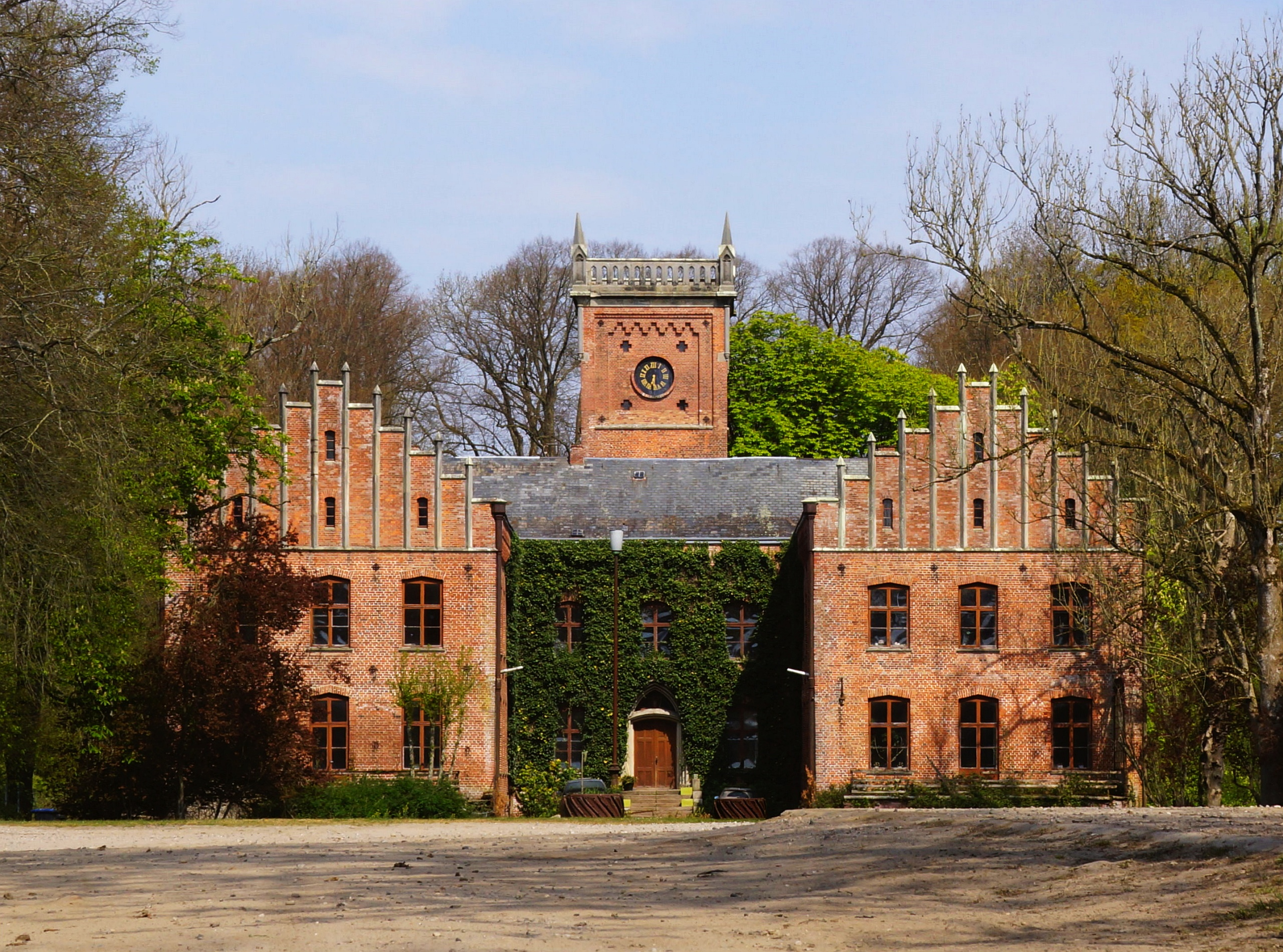 Gut Saxtorf ehem Adliges Gut mit Herrenhaus Persp von Saxtorf 4-6 Halbinsel Schwansen Schleswig-Holstein - Foto Wolfgang Pehlemann DSC07711